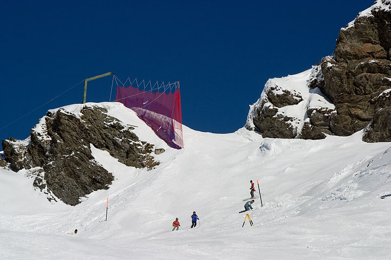 Der Hundschopf, eine Schlüsselstelle vom Lauberhornrennen